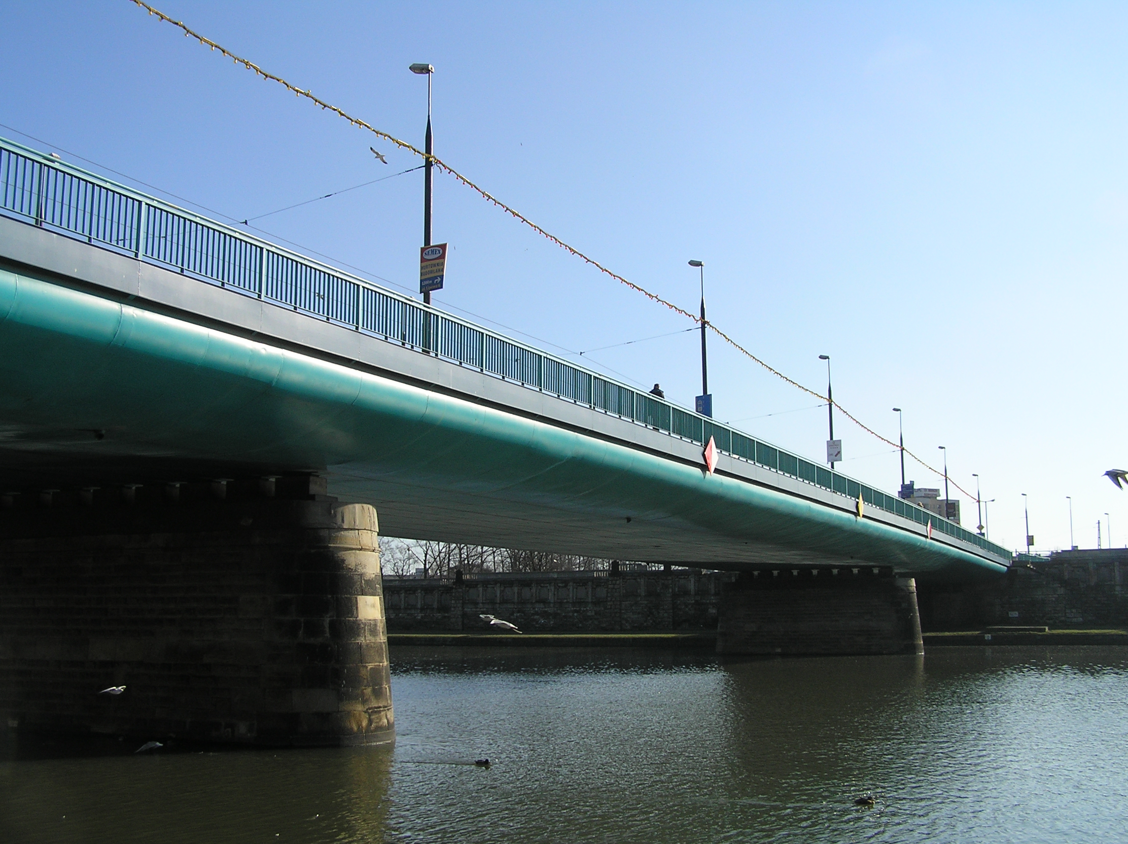 Most Powstańców Śląskich w Krakowie od strony Śródmieścia